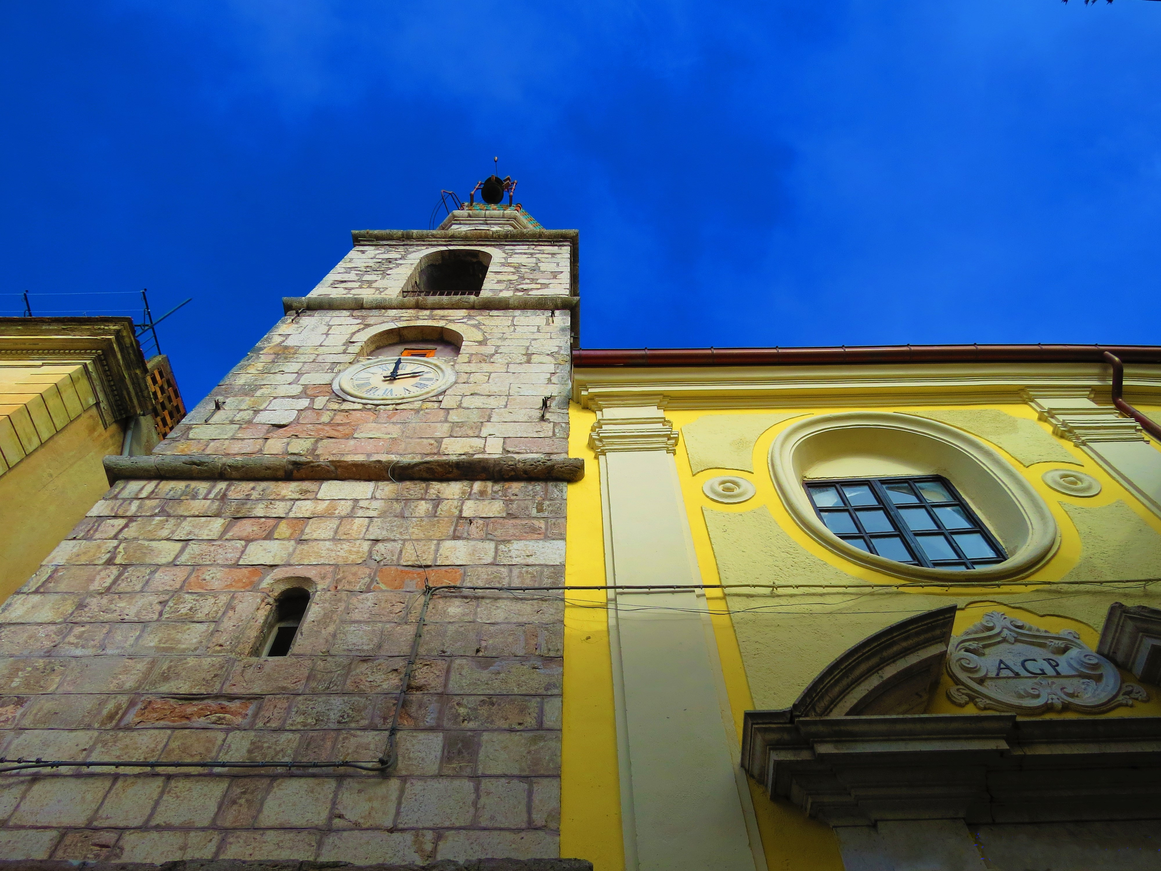 La chiesa dell'Annunciata a Guardia Sanframondi (BN)